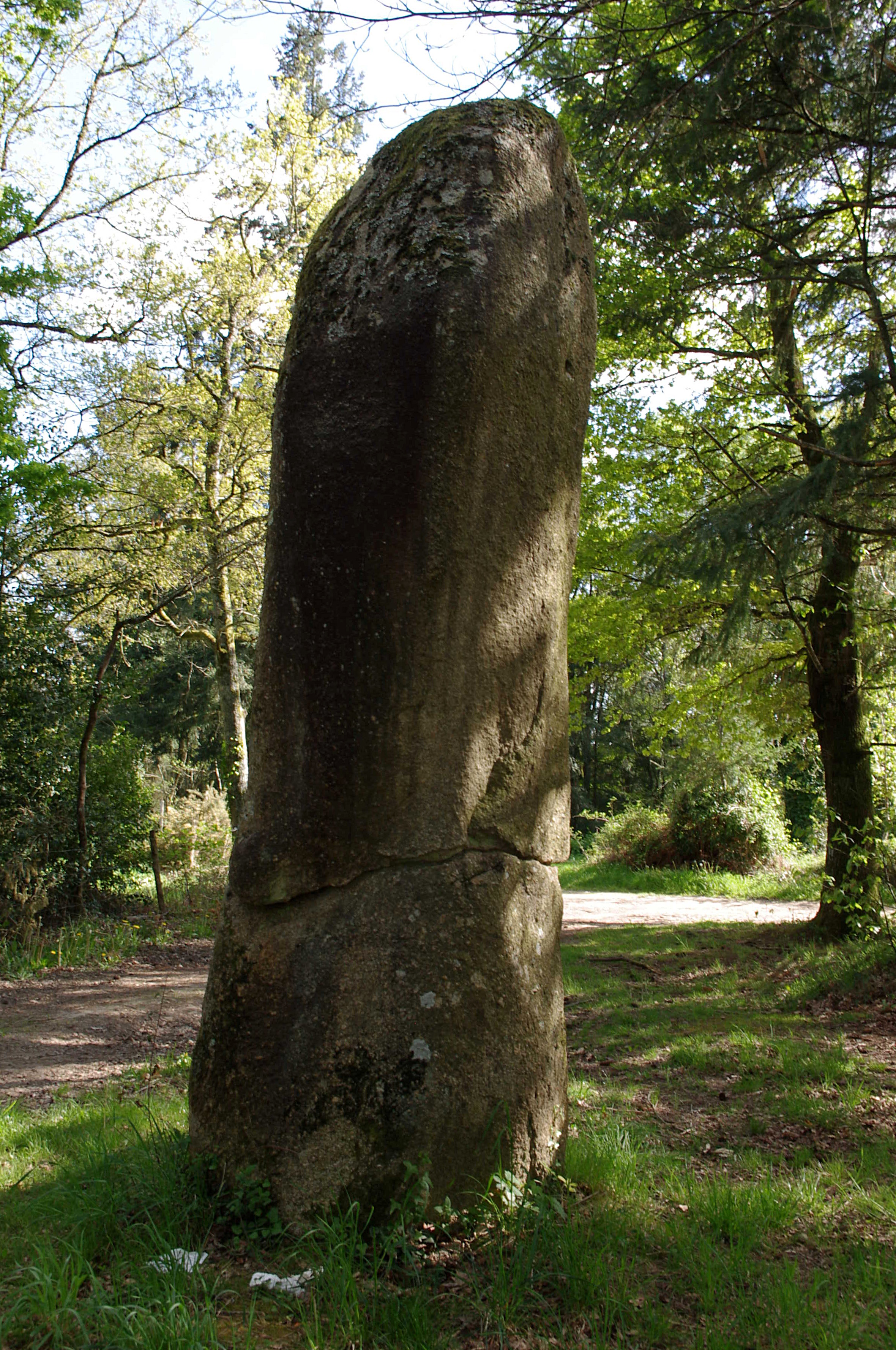 Menhir du Pic, commune de Javerdat, Haute Vienne